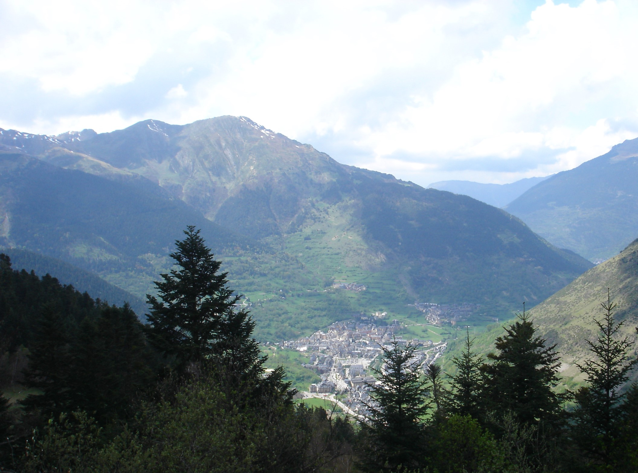 Vista del pico de Montcorbison con las poblaciones de Vielha, Casau y Gausac a sus pies